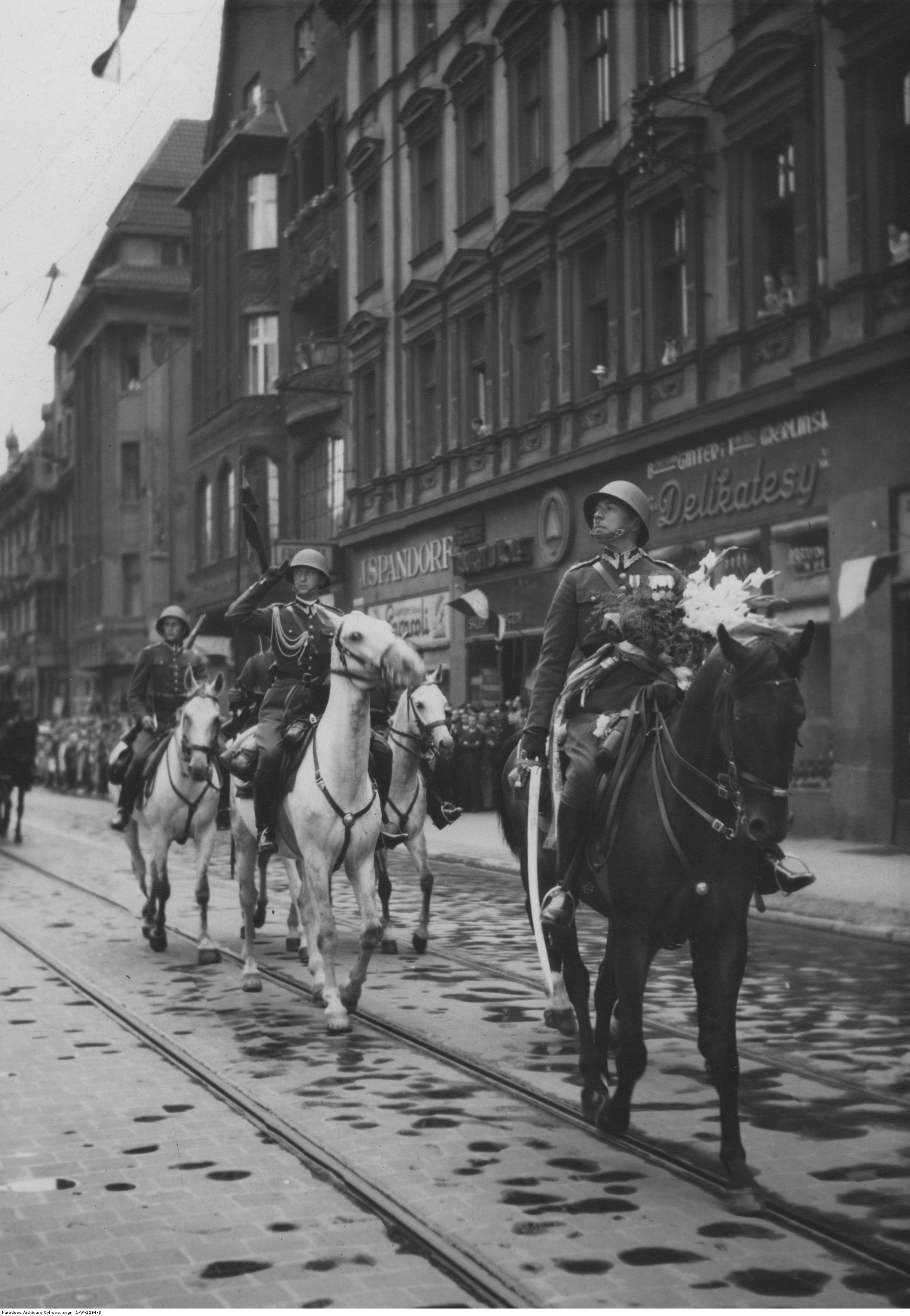 Święto 73 pułku piechoty w Katowicach - ppłk Piotr Sosialuk na czele defilady; lipiec 1938. Koncern Ilustrowany Kurier Codzienny - Archiwum Ilustracji. Sygnatura: 1-W-1294-8